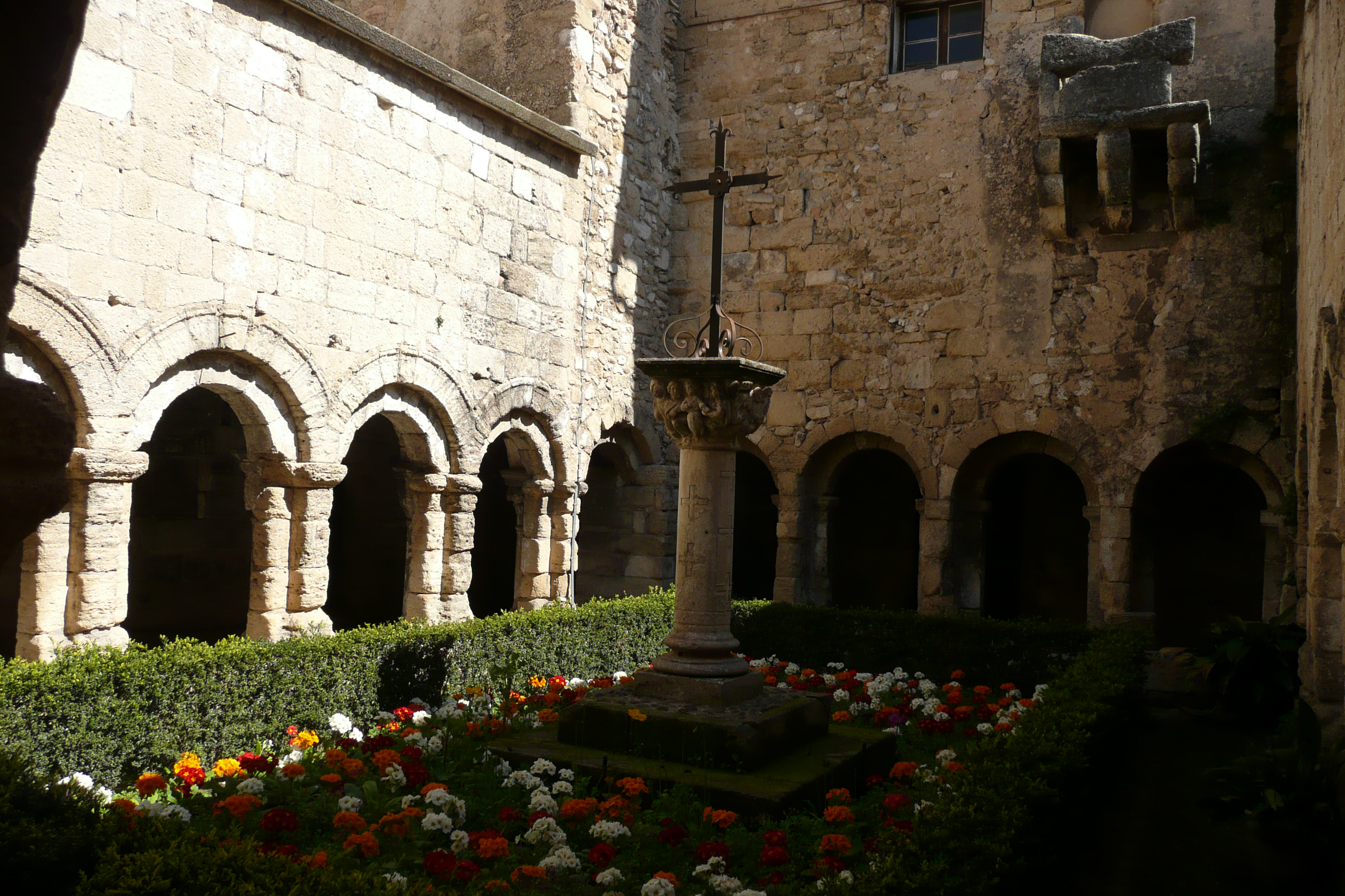 Cloitre de la cathèdrale Saint Véran à Cavaillon.